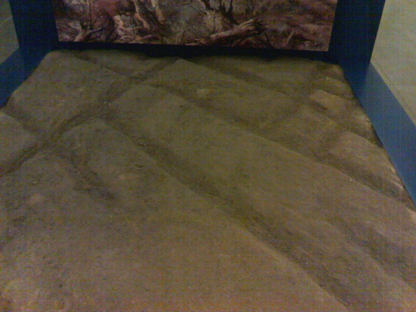 Particolare del calco di arature di età neolitica rinvenuto in via A. Diaz, durante i lavori di scavo della stazione Toledo della metropolitana di Napoli.